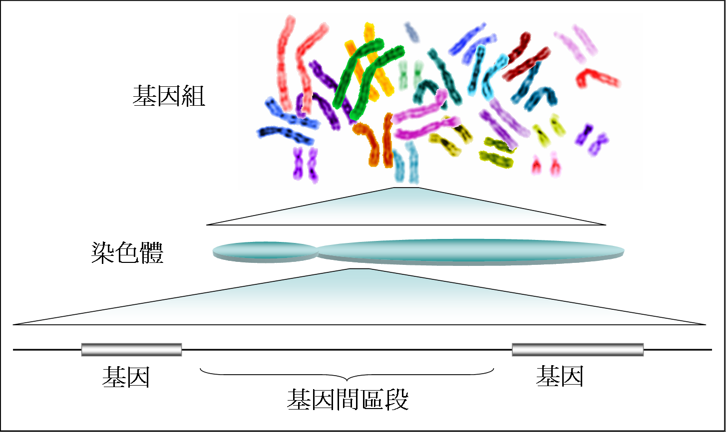 加工自：Image:Human genome to genes.png 中文化：Bstlee